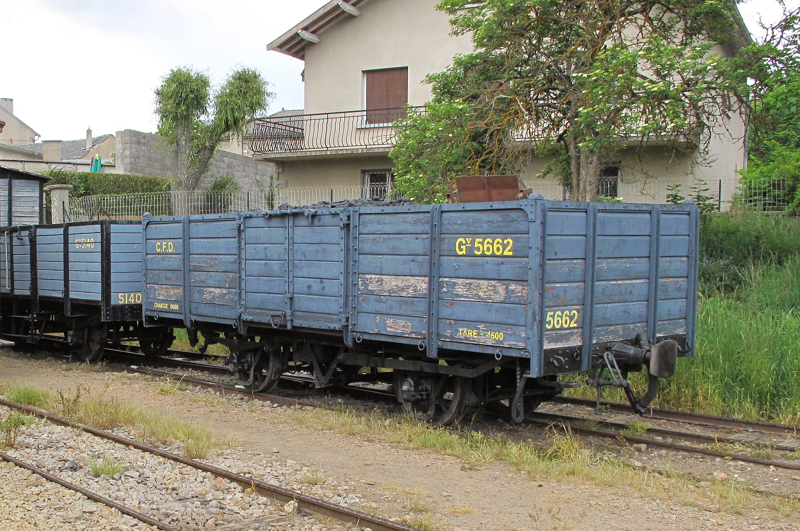 Le wagon tombereau CFD G-5662 des Voies Ferrées du Velay, en gare de Tence (Haute-Loire) le 20 mai 2011.